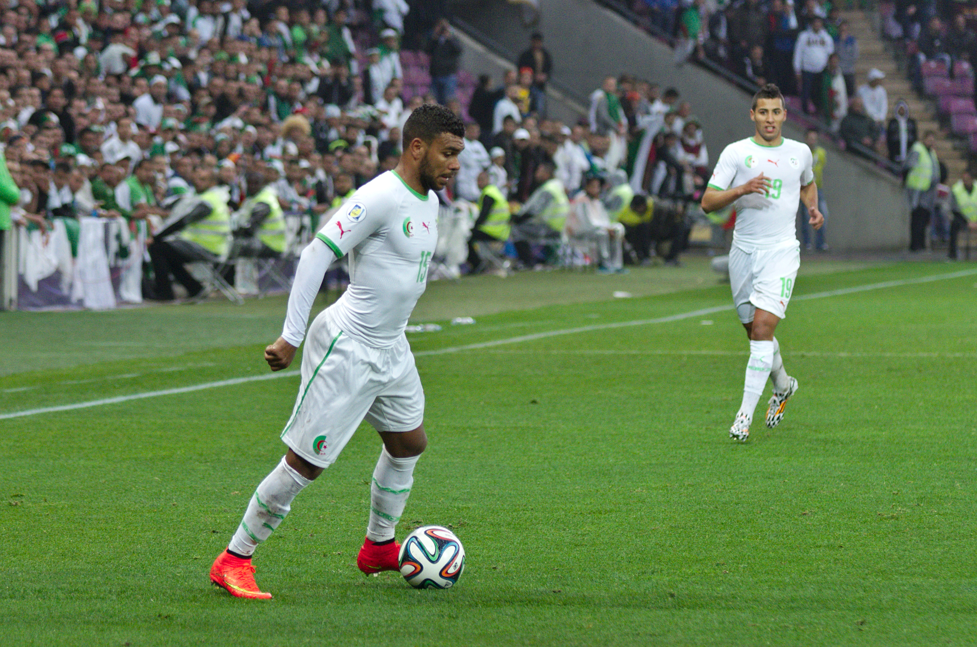 Algérie-Roumanie - 20140604 - El Arbi Hillel Soudani